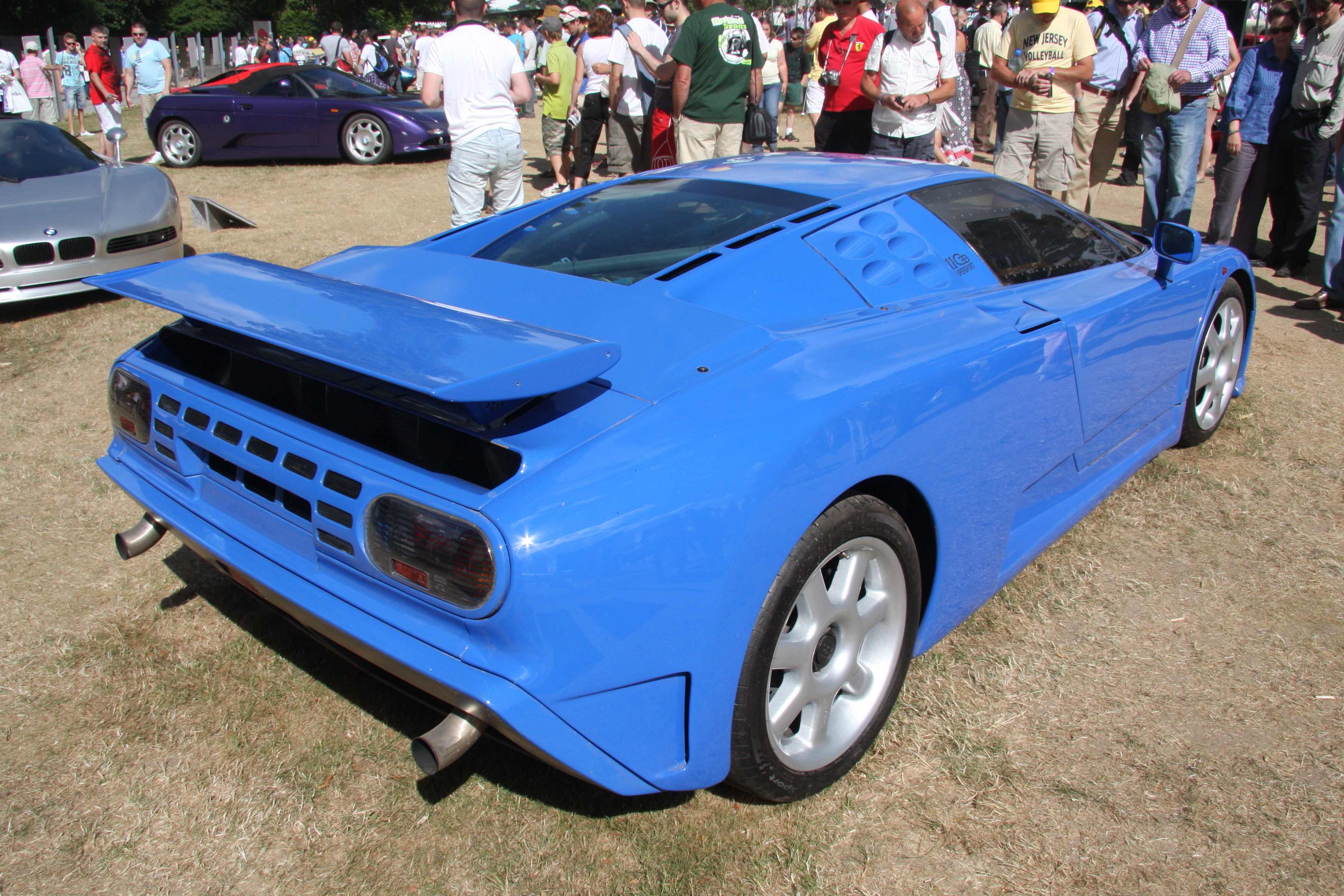 1992 Bugattio EB110 SS